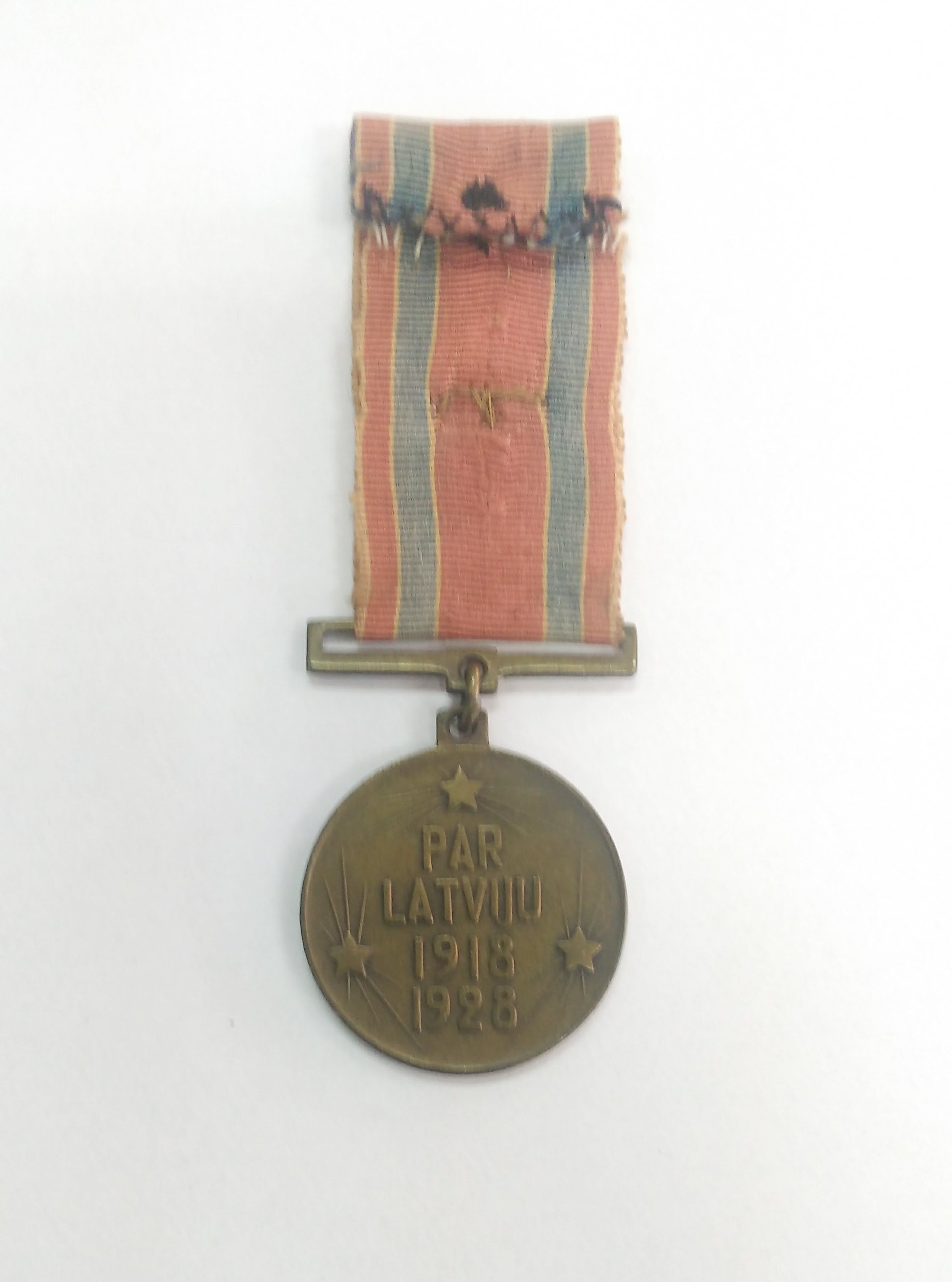 Rewers łotewskiego Medalu 10 Rocznicy Wojny Niepodległościowej